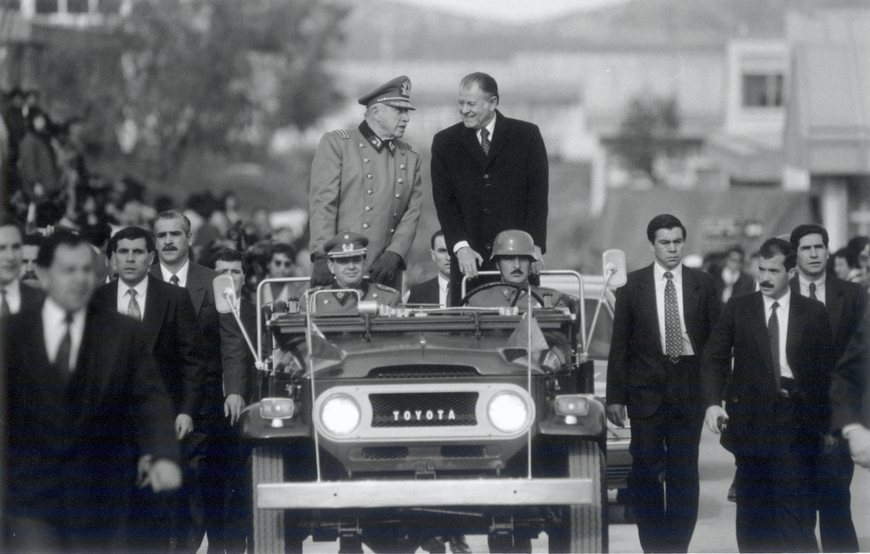 El Pdte. Patricio Aylwin y Augusto Pinochet Ugarte.